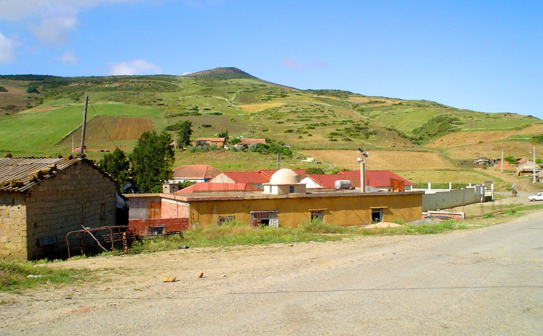 منطقة سيدي يوم في ولاية المدية، وهي تابعة لبلدية وامري